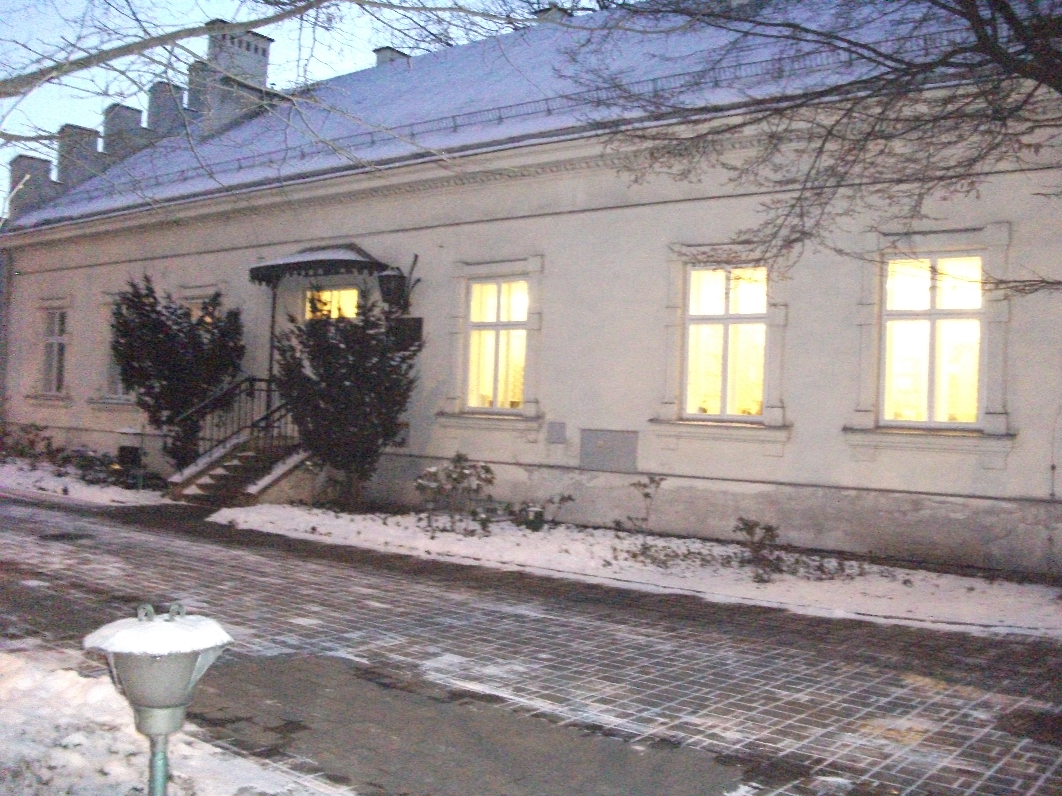 Willa przy ul. Powroźniczej 2 w Krakowie - od frontu